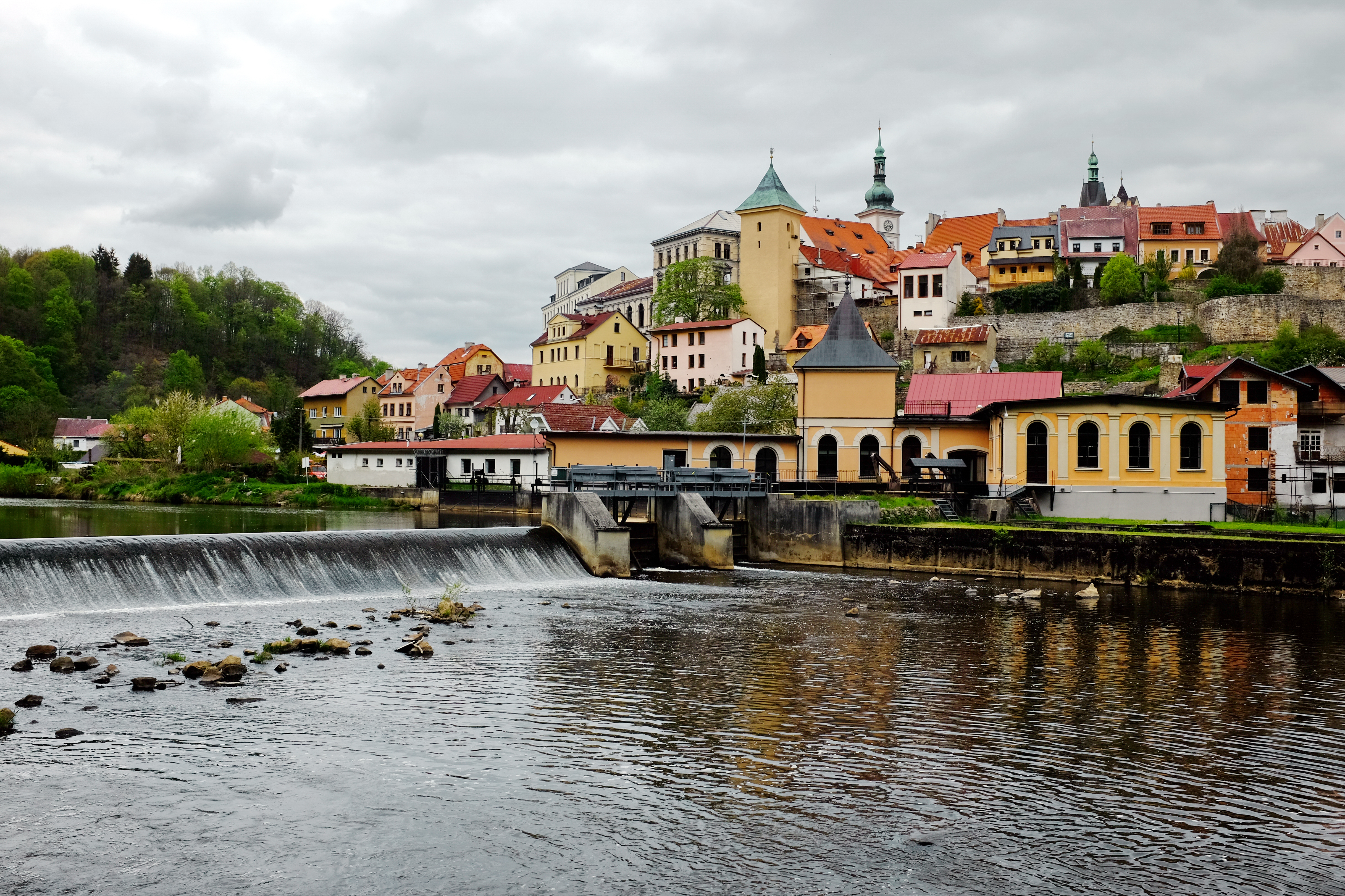 Ohře v Lokti, horní jez, okres Sokolov